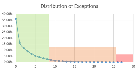 Numbre d'exceptions d'un backtesting VaR 10D sur 250 jours